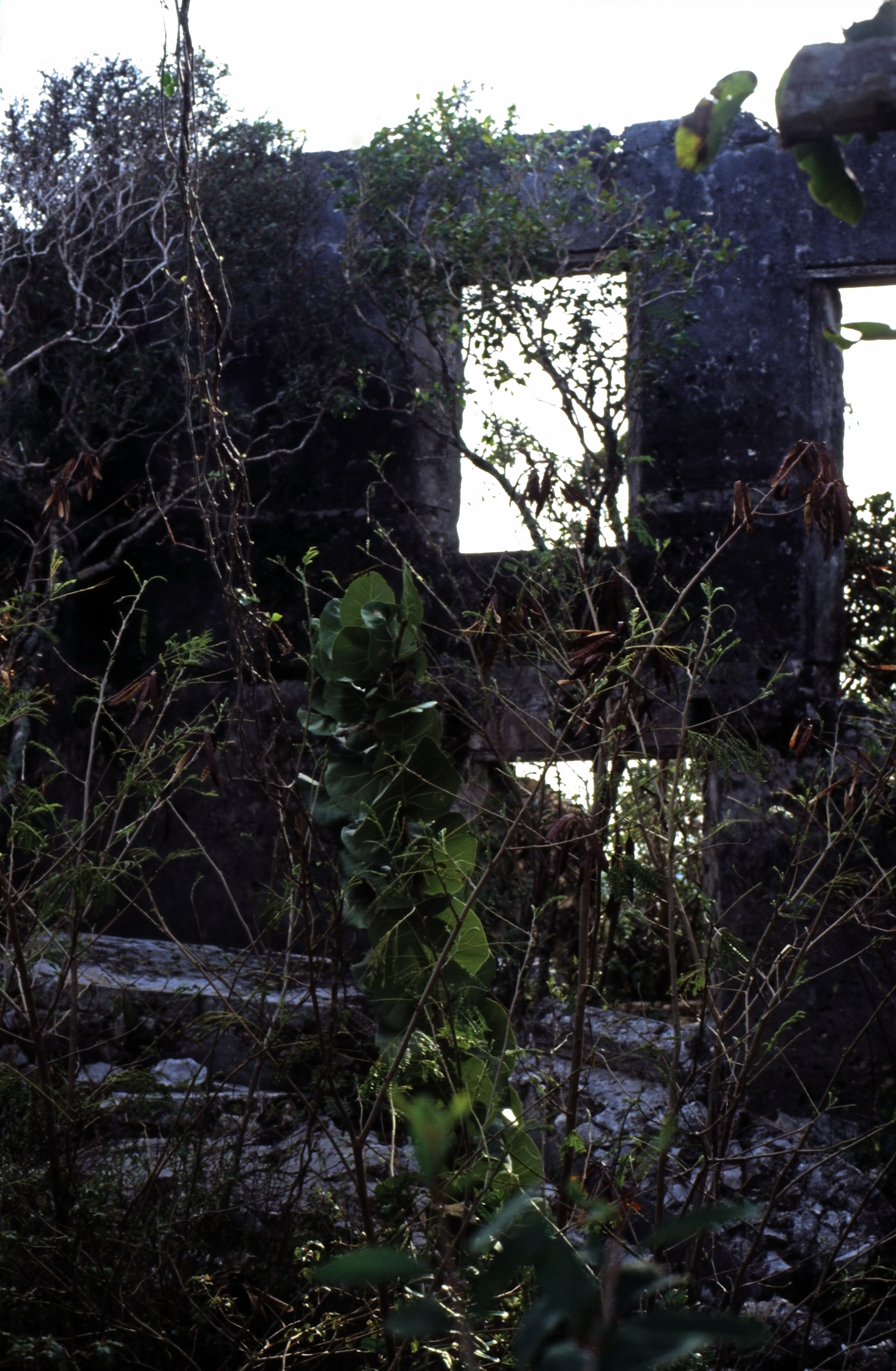 Ruine des Haupthauses der Farquharson Plantation oder Fortune Hill an der Ostküste von San Salvador . Sie war größte und ist jetzt (2016) am besten erhaltene Plantagenruine aus der Zeit der Loyalisten und der Sklaverei.